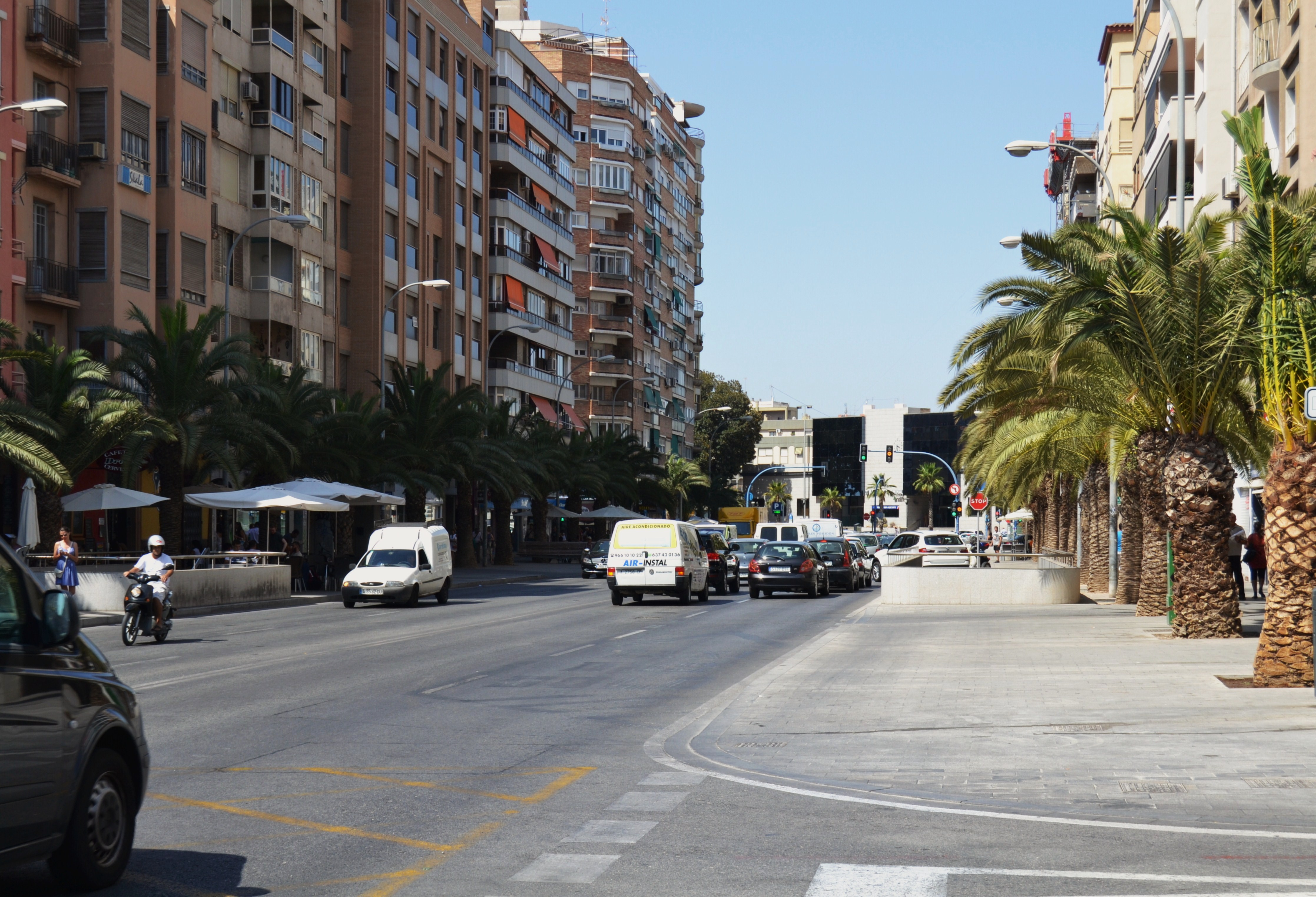 Avinguda de l'Estació, Alacant.